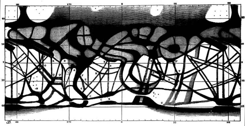 Dessin de la surface de Mars en janvier et février 1888, par Perrotin, Observatoire de Nice